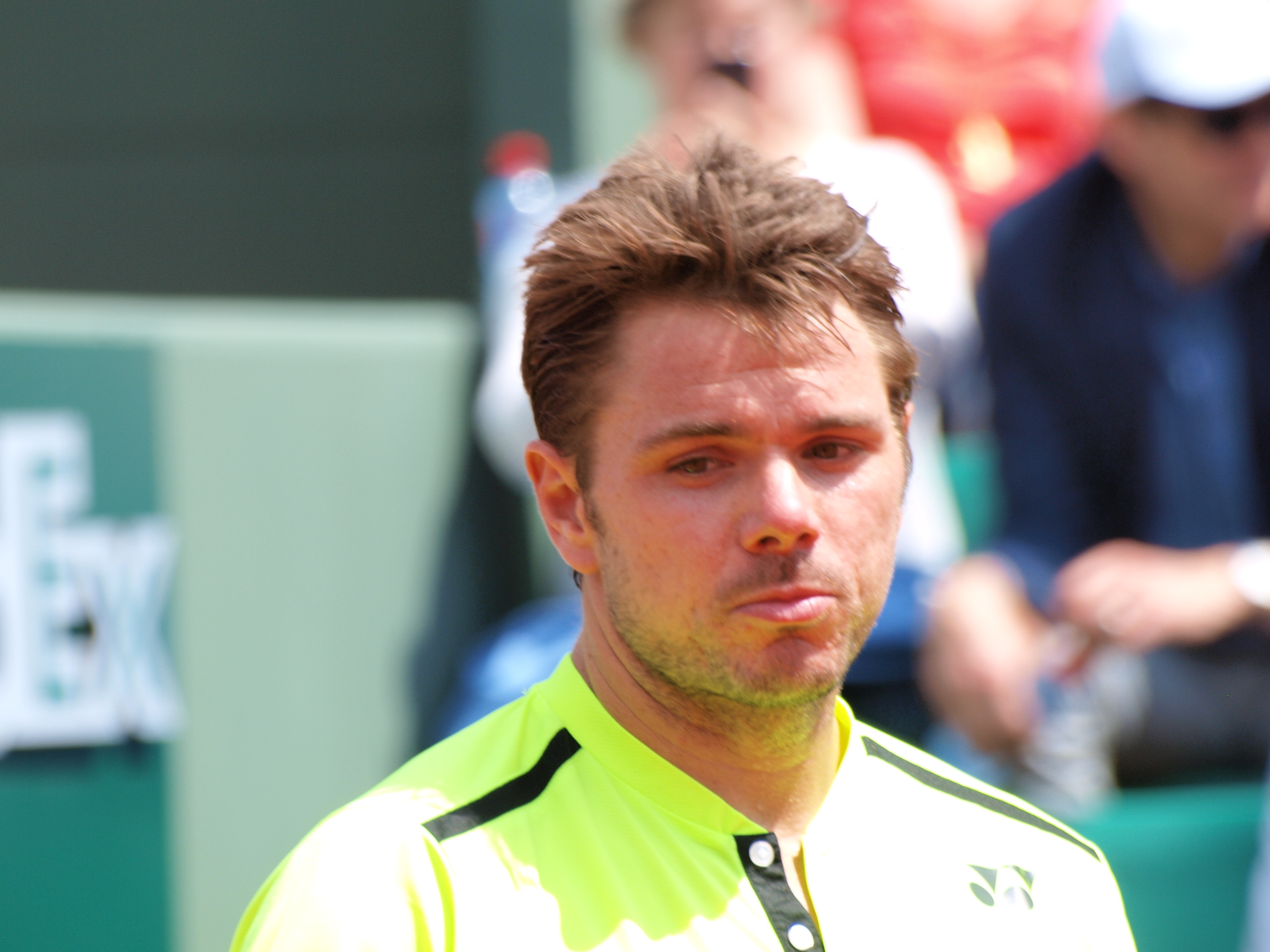 Le joueur de tennis helvète Stanislas Wawrinka, lors des internationaux de France de tennis , sur le stade Roland Garros, à Paris, le 25 mai 2016, dans son duel sportif contre le joueur nippon Taro Daniel.